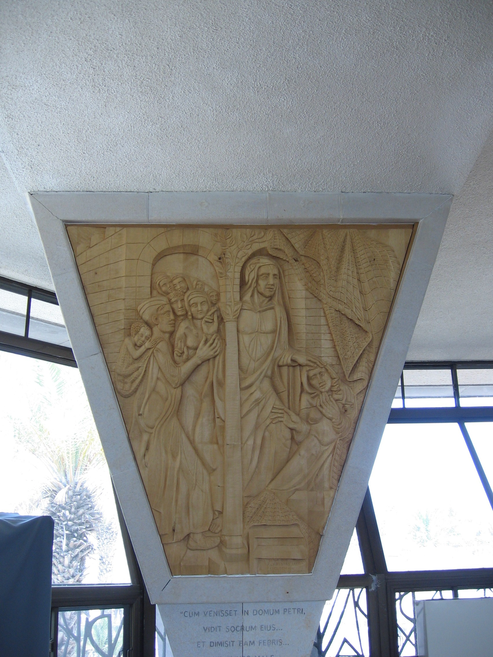 Cafarnao: la chiesa di san Pietro.